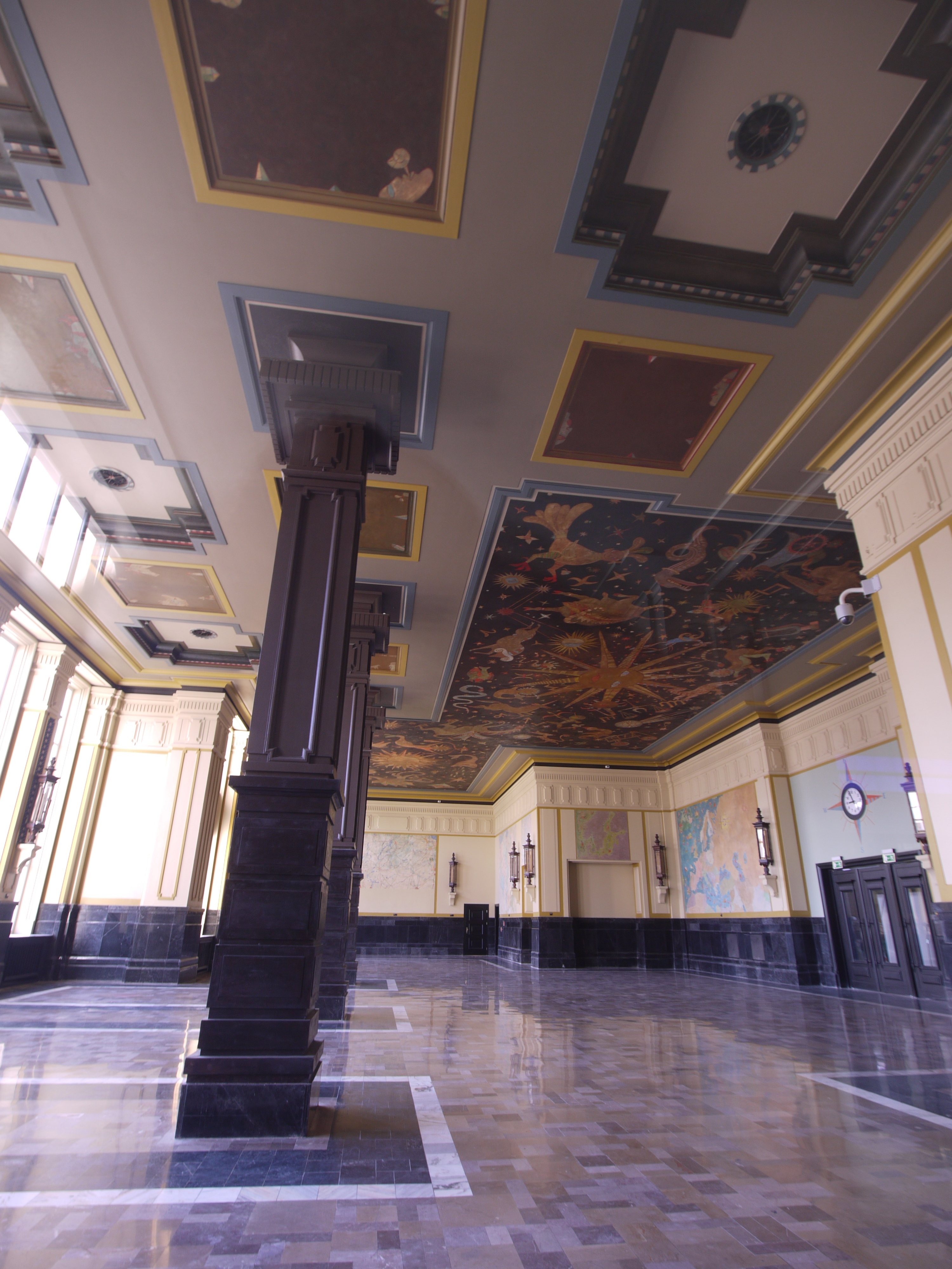 Dworzec Gdynia Główna: budynek dworca głównego - wnętrze. Odnowiona sala restauracyjna. Wnętrze po remoncie przeprowadzonym w latach 2010-2012. Plac Konstytucji 1, Gdynia